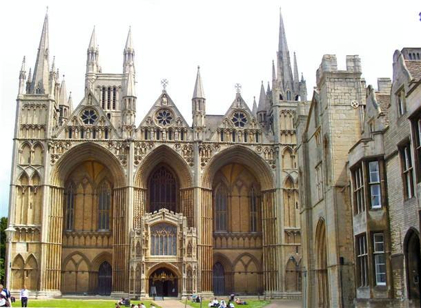 Frontalansicht Peterborough Cathedral